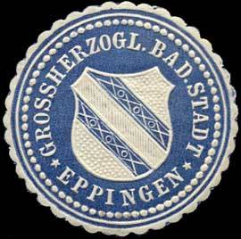 Sealing stamp Title: Grossherzogl. Badische Stadt Eppingen Description: blau, weiß, geprägt Place: Eppingen size: 3 cm